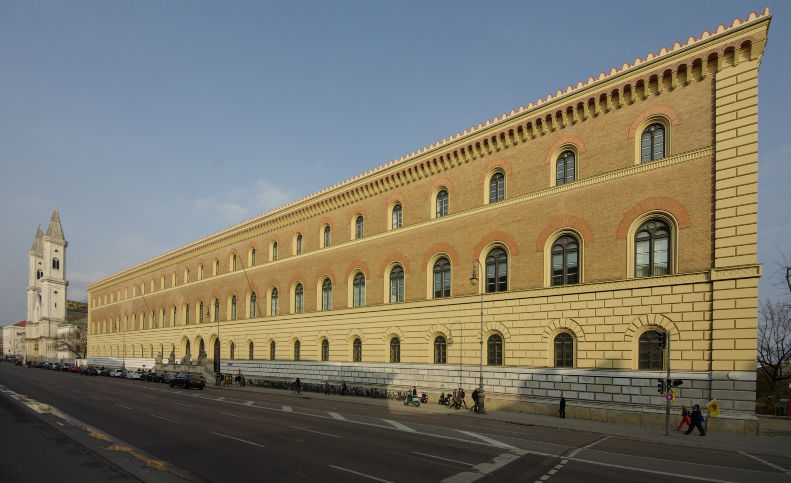 München, Bayerische Staatsbibliothek (Ludwigstraße 16), Friedrich von Gärtner, 1832-1842